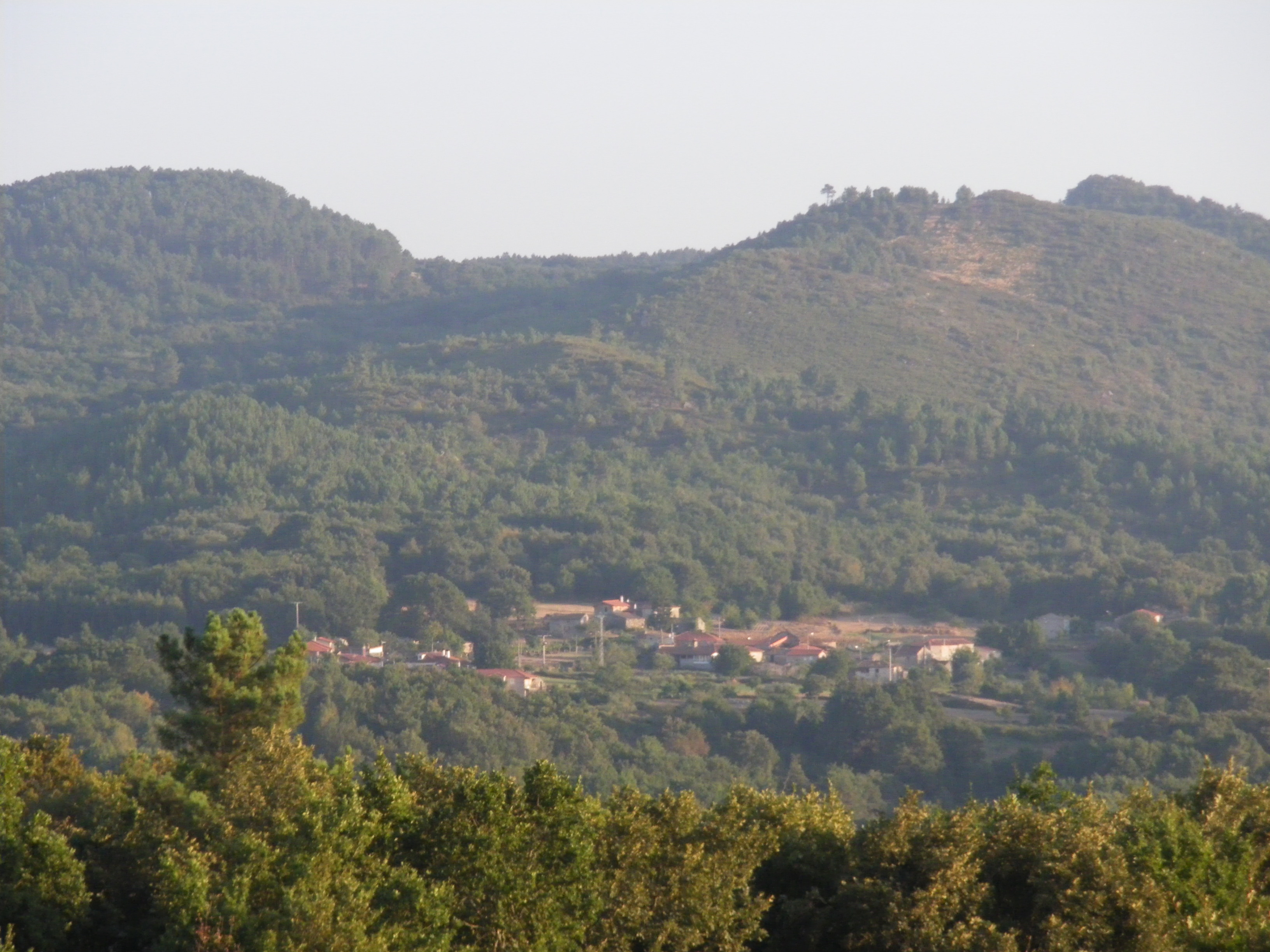 Vista de Paciños dende Vilariño do Río